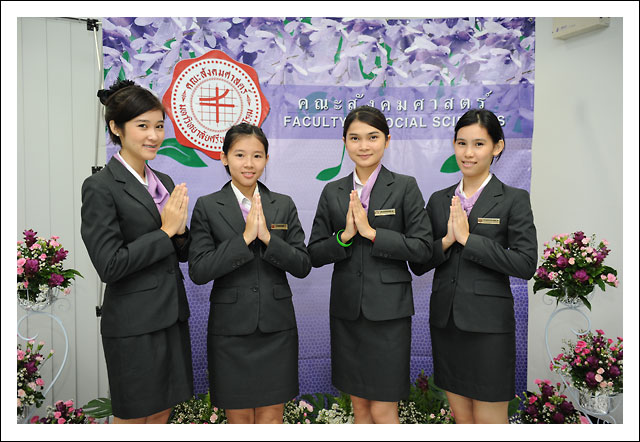 welcome